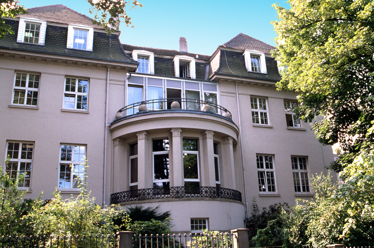 TAW Hauptgebäude Elberfeld